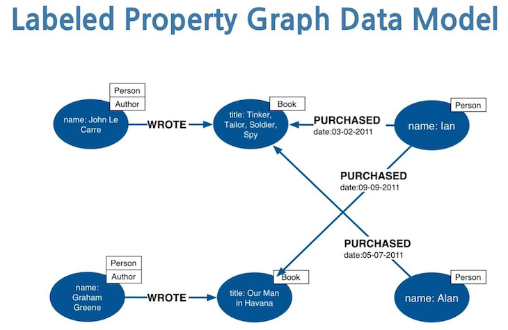 Монгол: Хаяглагдсан шинж чанартай график өгөгдлийн загвар